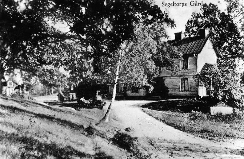 Segeltorps gård före 1964 (troligen 1910)